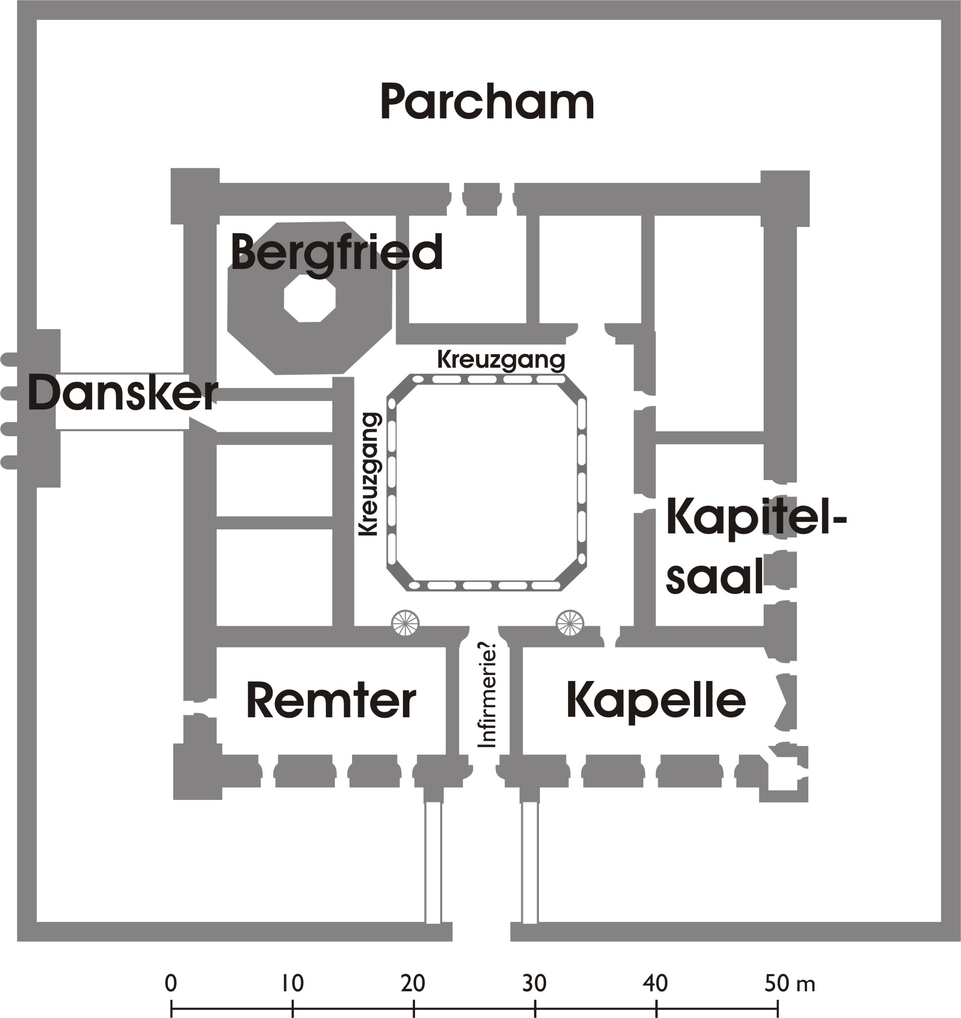 Grundriss der Deutschordensburg Rehden